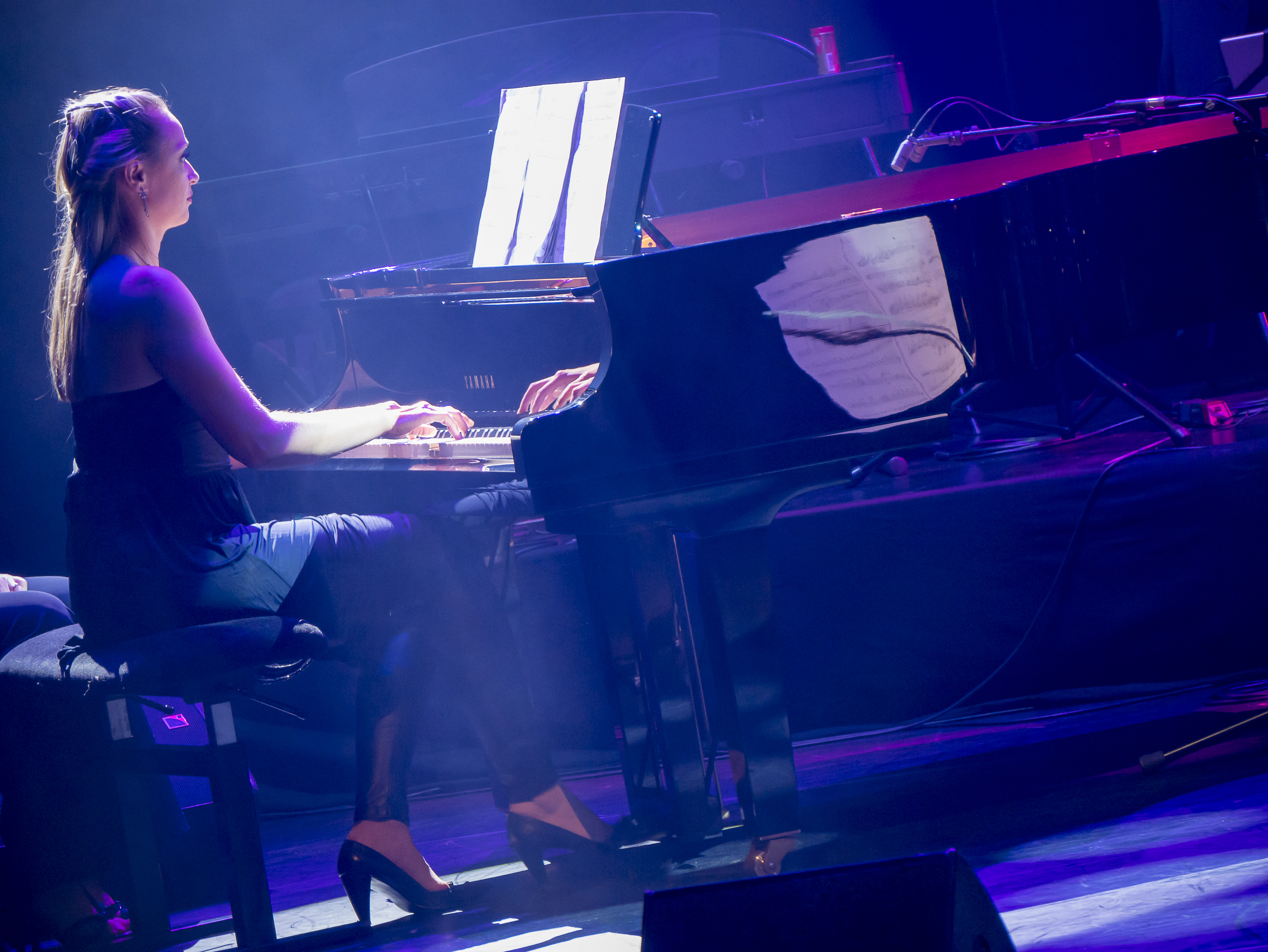 Rossitza Milevska, pianiste, harpiste et chanteuse, sur la scène du Théâtre Intercommunal le Forum, Fréjus, France.